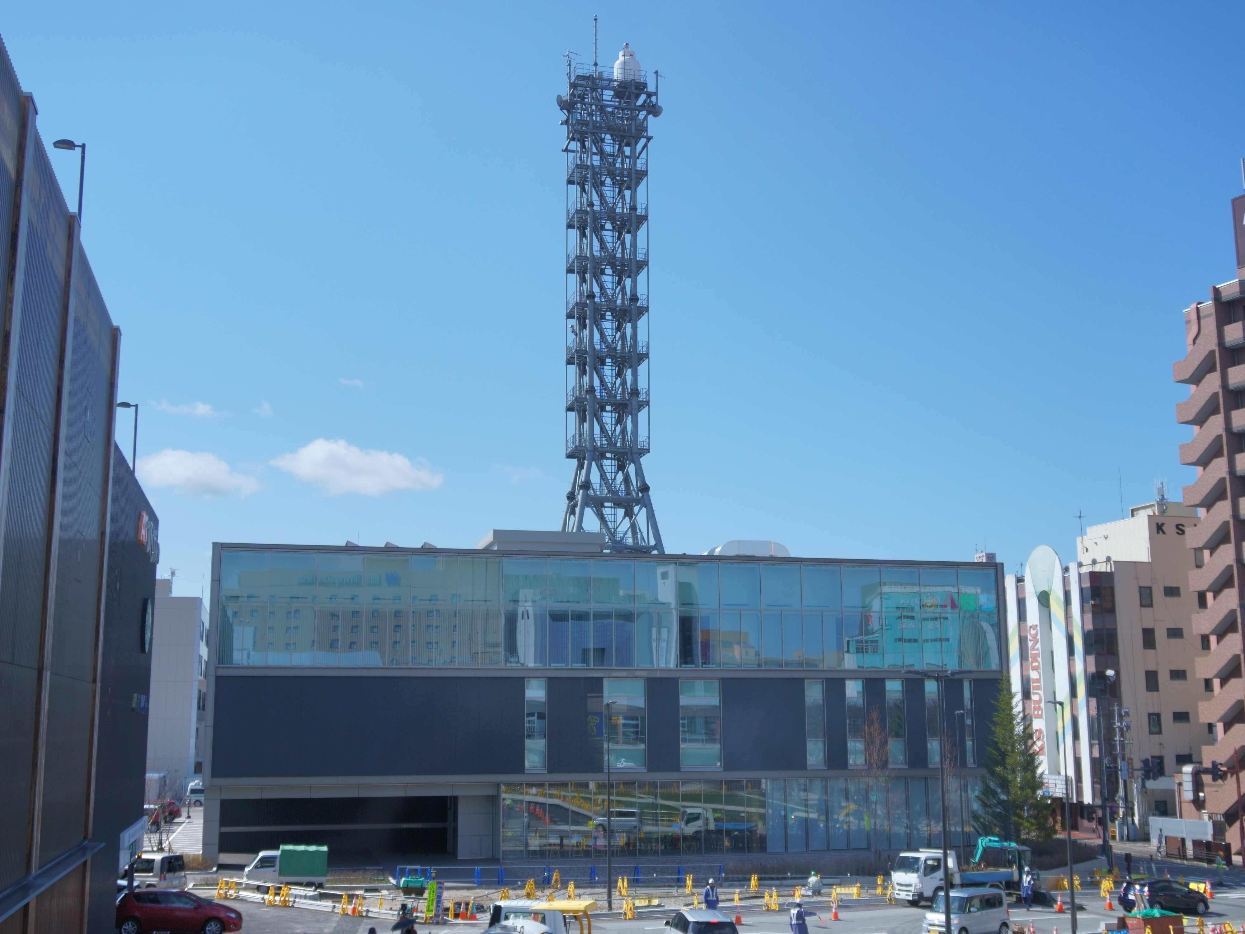 秋田放送新本社（秋田市中通）。2019年に新本社が竣工、およそ1年間の準備期間を経て2020年4月より執務を開始した。